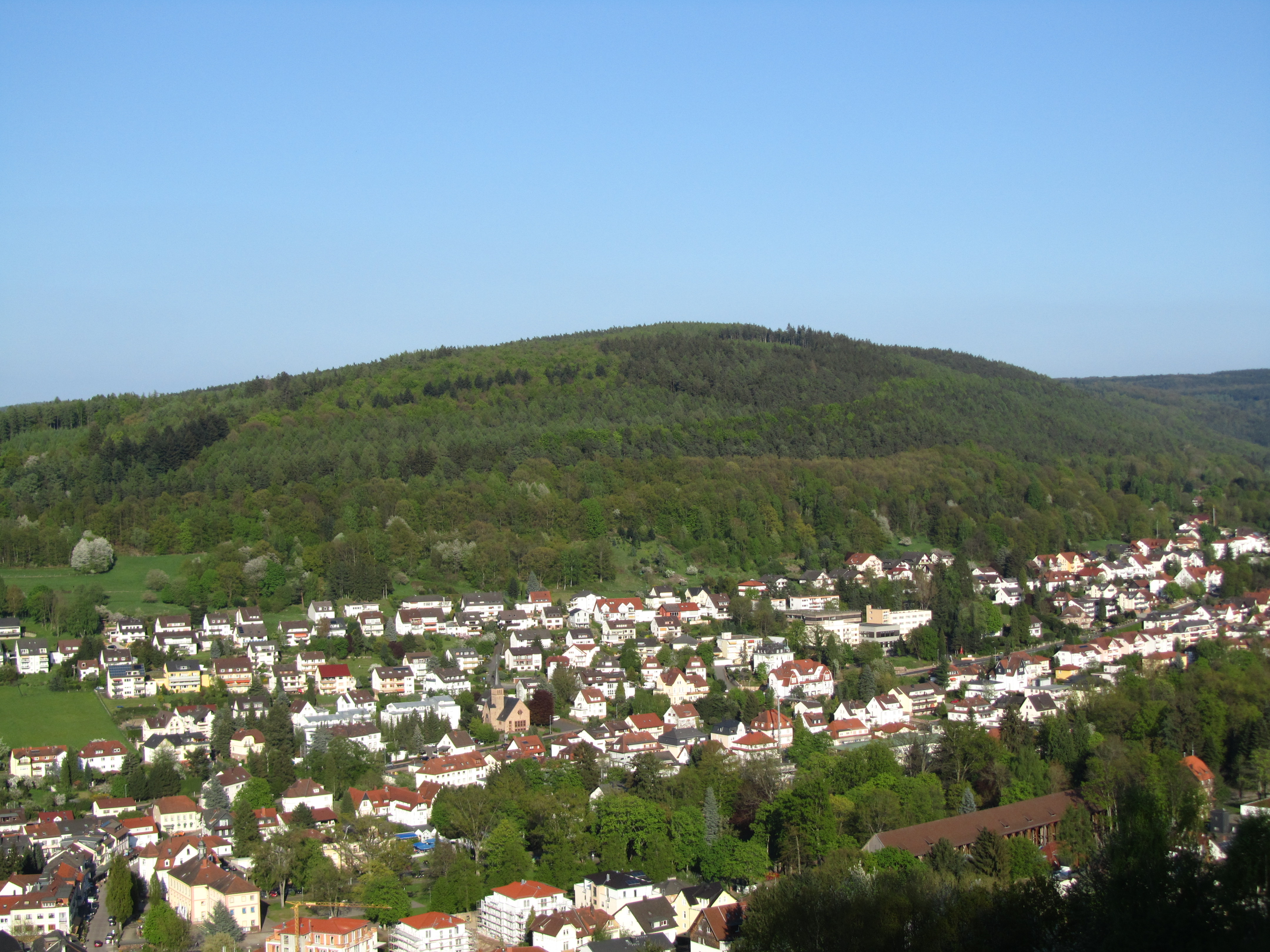 Blick vom Molkenberg über Bad Orb zum Wintersberg